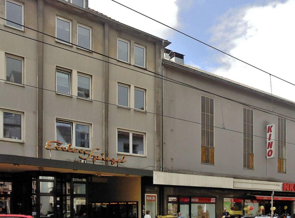 Programmkino "Eulenspiegel" im Essener Südostviertel, unter Denkmalschutz